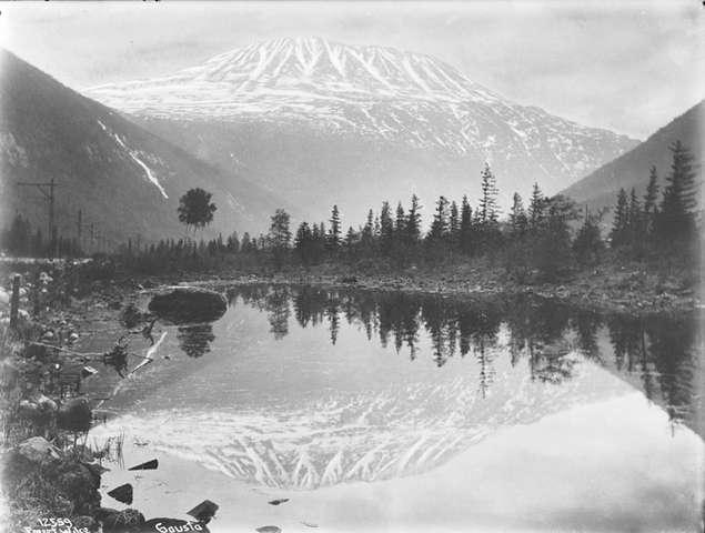 гора Гёуста, Телемарк, Норвегия